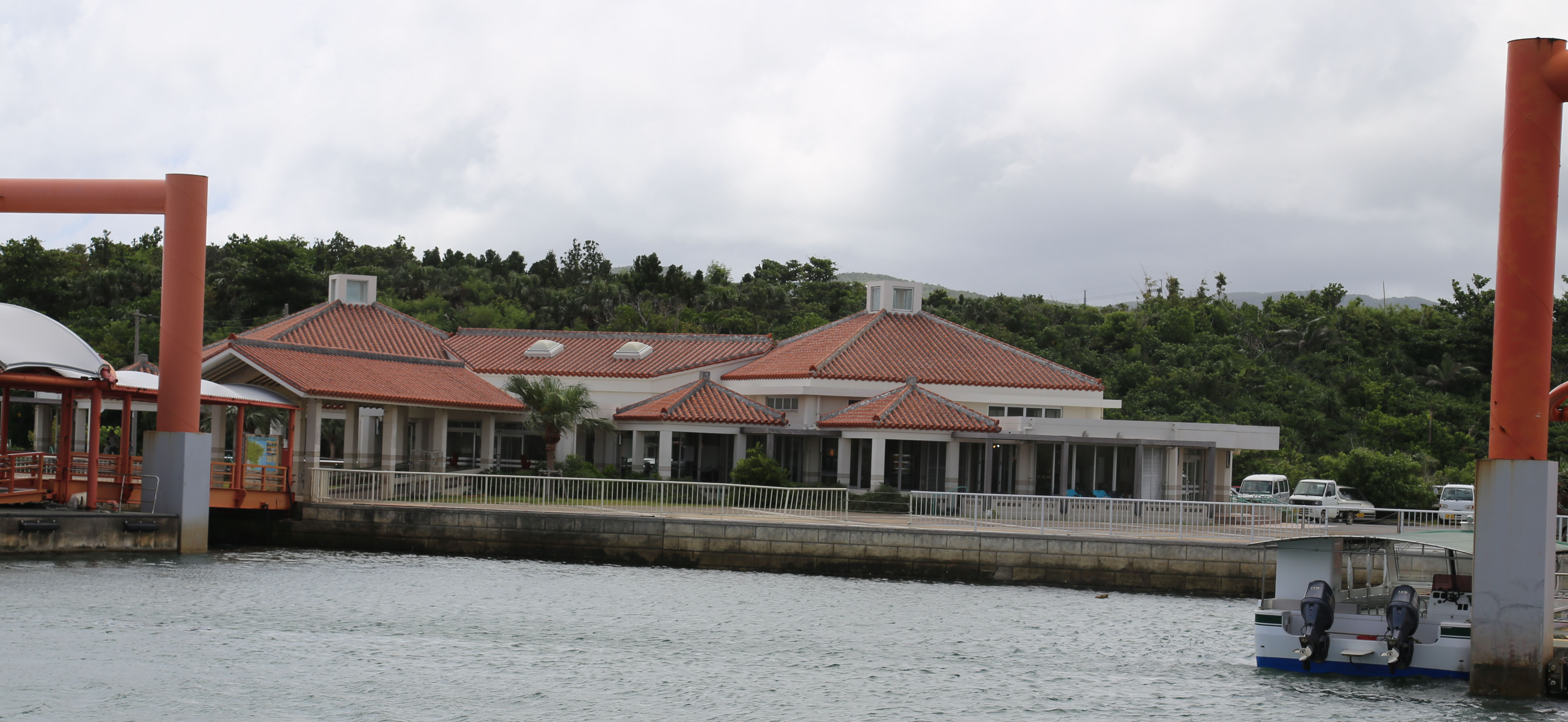 仲間港（大原港）